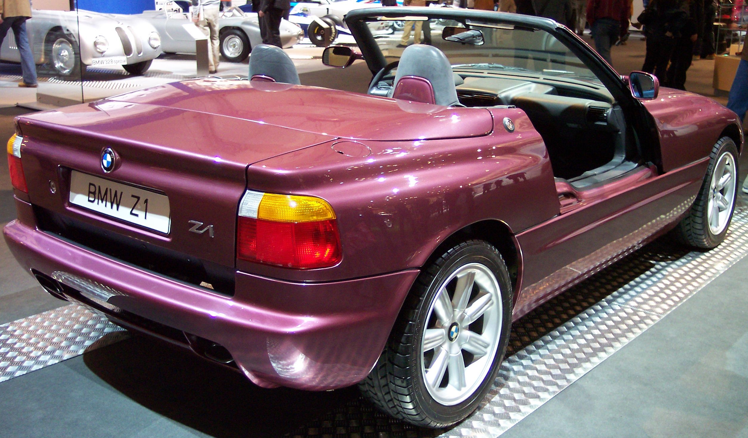 BMW Z1